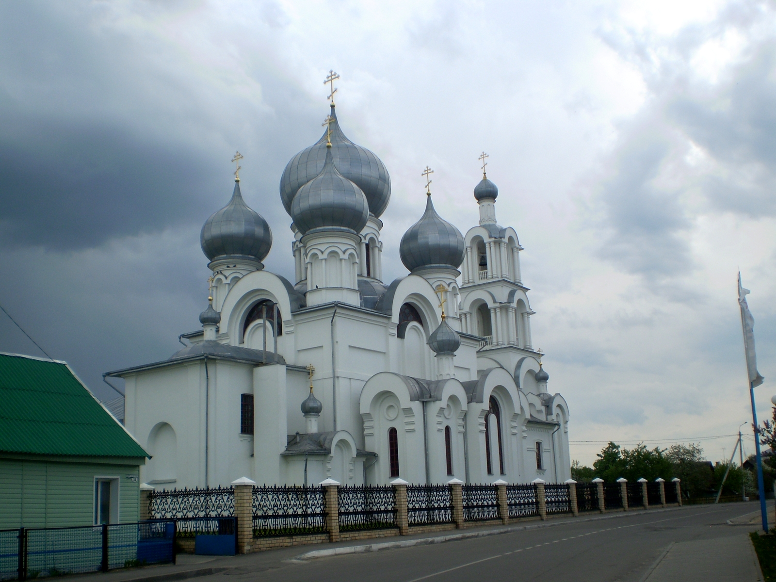 Свята-Петра-Паўлаўская царква